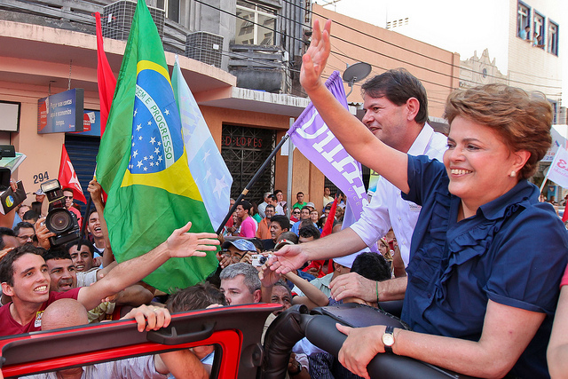 26/10/2010 - Dilma fez carreata pelo centro de Fortaleza acompanhada por milhares de eleitores. (Foto: Roberto Stuckert Filho)